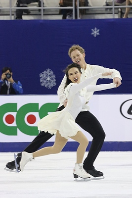 Мэдисон Чок и Эван Бейтс на Cup of China 2012.